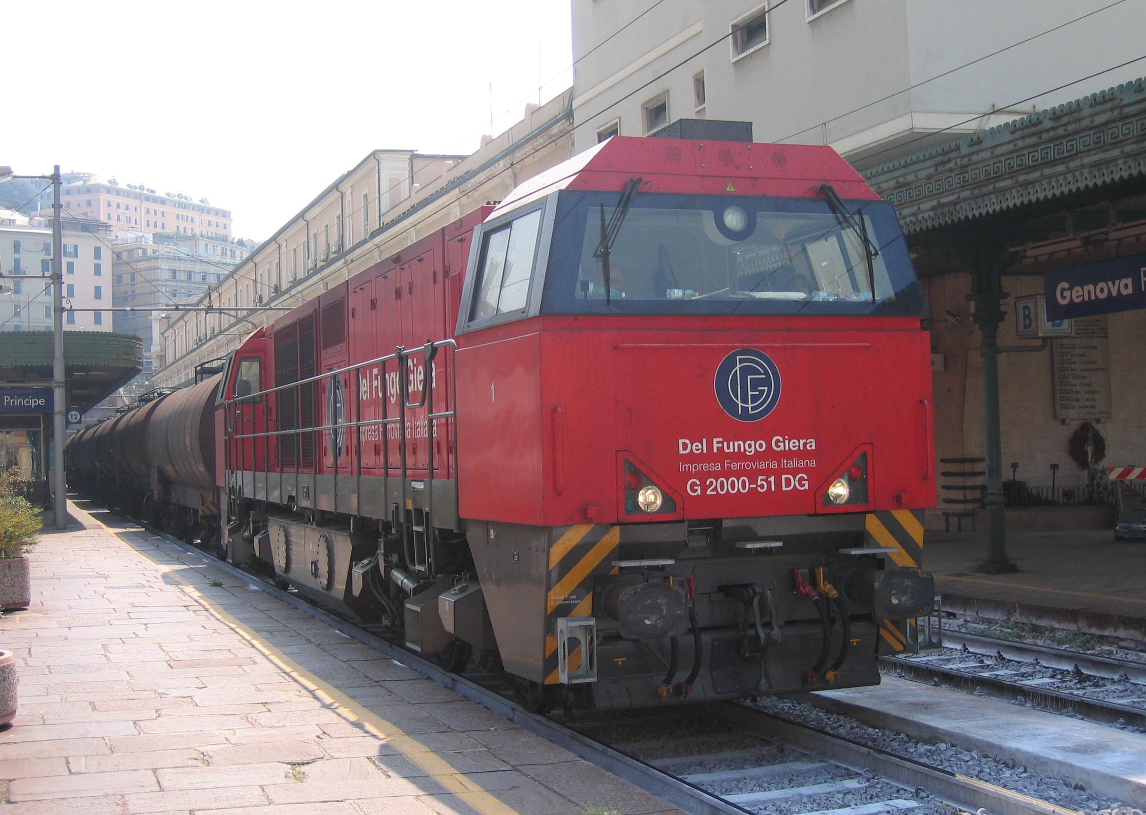 Treno di ferrocisterne Del Fungo Giera trainato dalla locomotiva diesel G 2000-51, in sosta a Genova Piazza Principe.